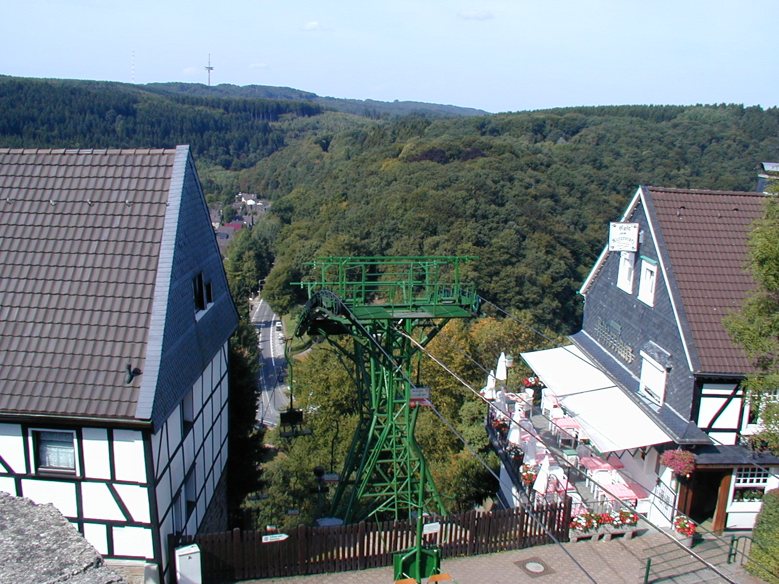 Seilbahn auf Schloss Burg 2003 selbst fotografiert